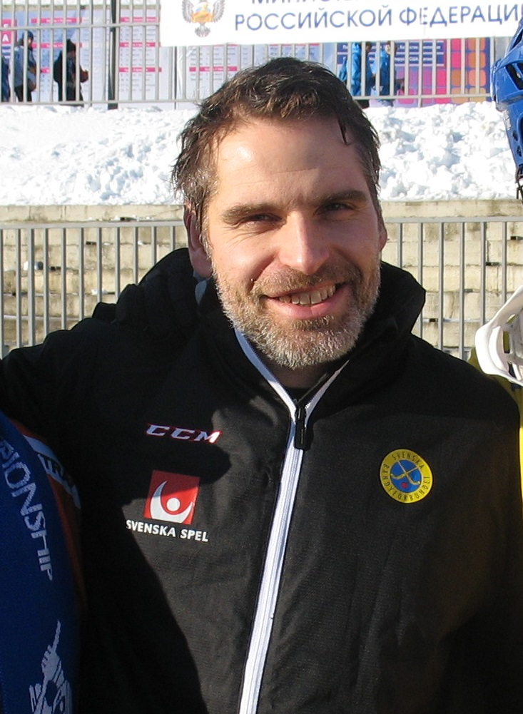 Фотография игрока сборной Швеции по хоккею с мячом Андреаса Веста, сделана во время чемпионата мира 2016 в Ульяновске